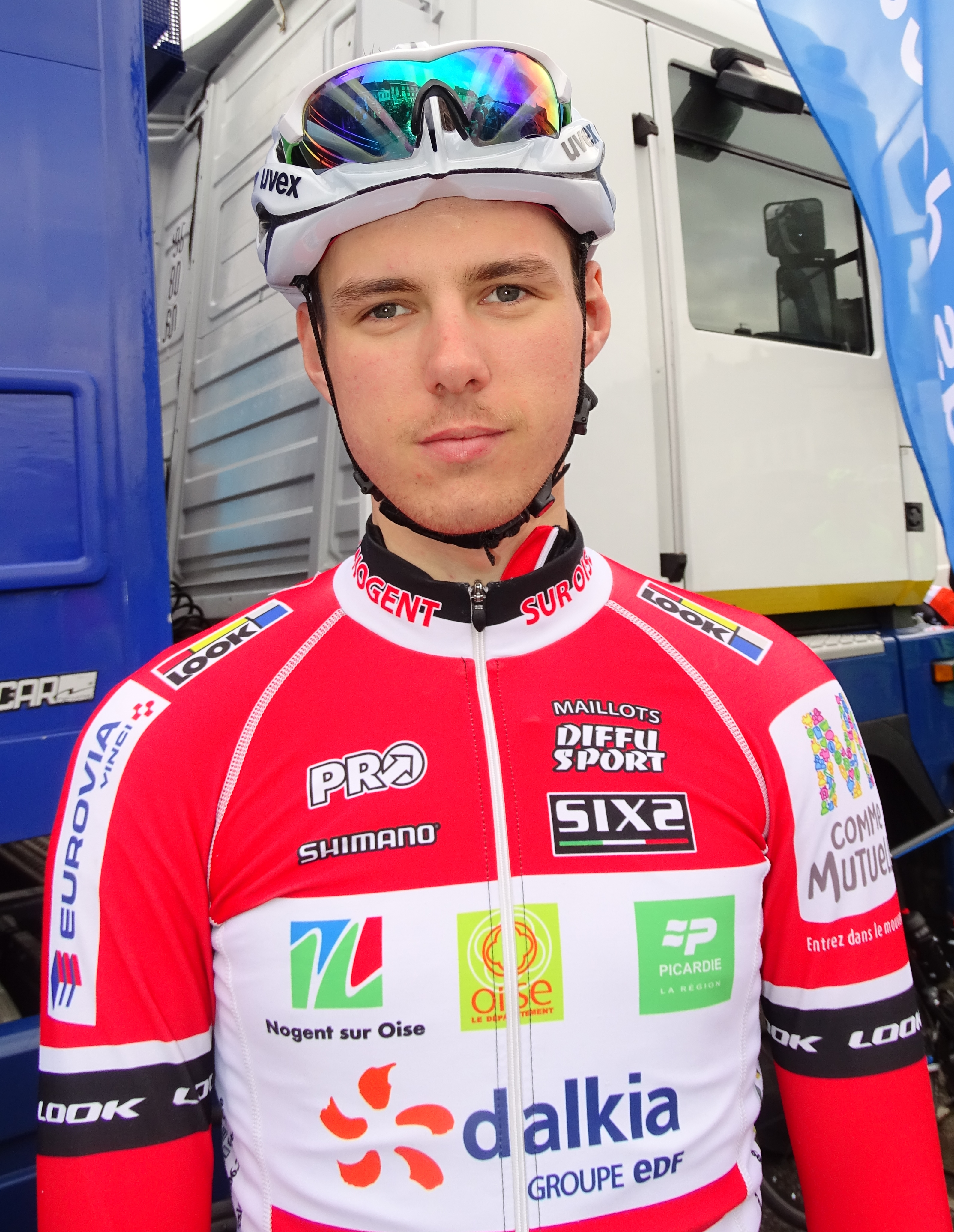 Reportage réalisé le dimanche 6 mars à l'occasion du départ et de l'arrivée du Grand Prix de Lillers-Souvenir Bruno Comini 2016 à Lillers, Pas-de-Calais, Nord-Pas-de-Calais, France.